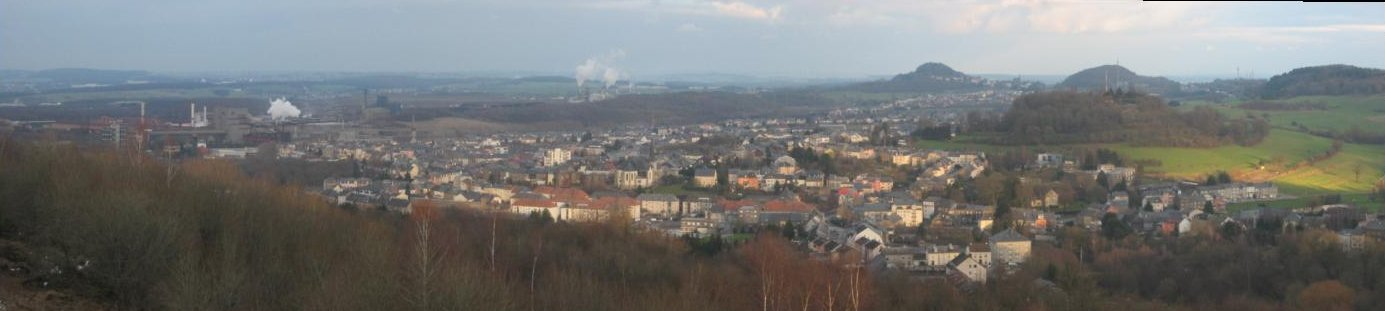 Panorama imageDifferdange, Oberkorn, Pano